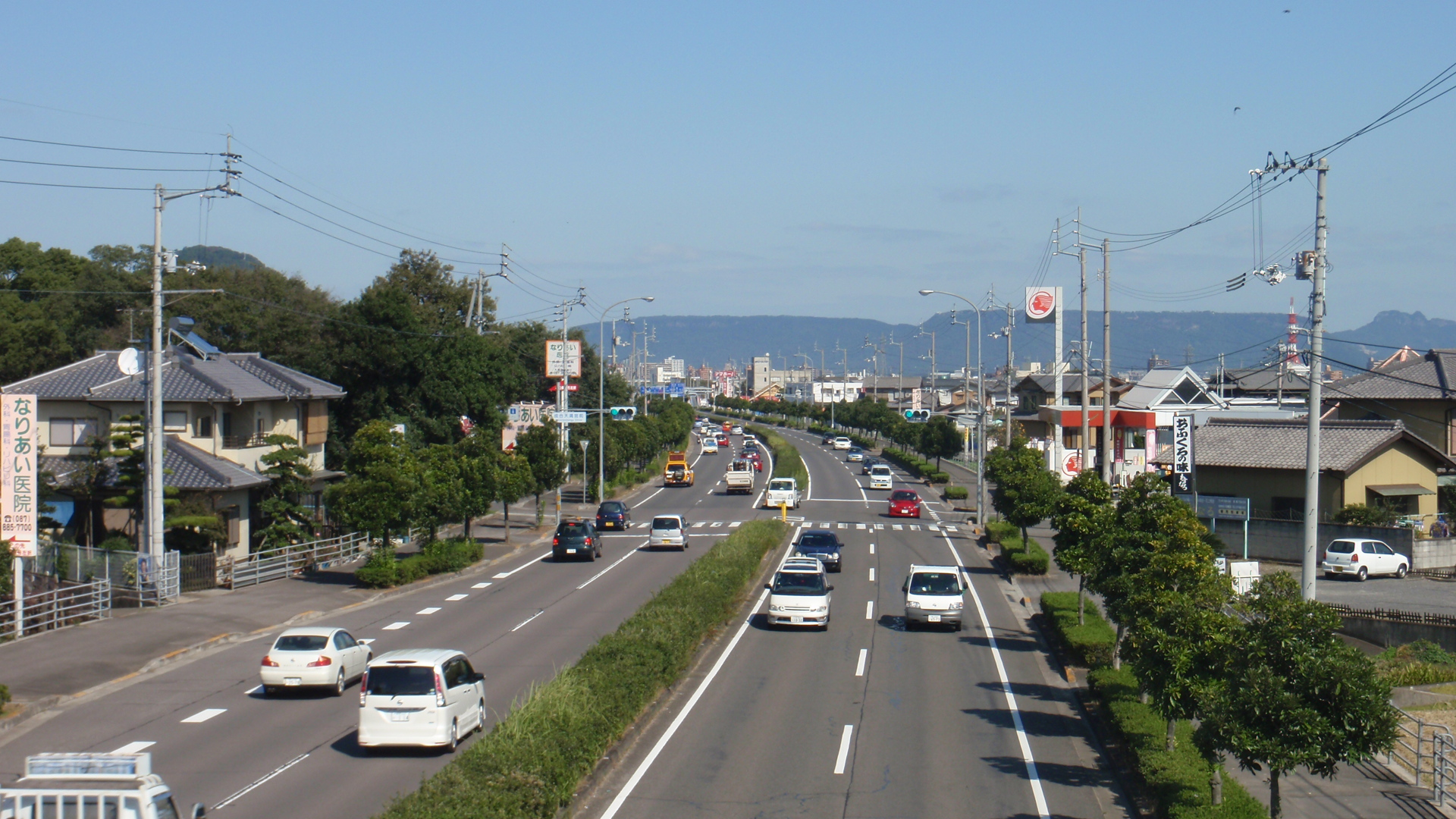 国道32号成合大橋東交差点から北東方向（峰山口方面）を見る。背景は屋島。